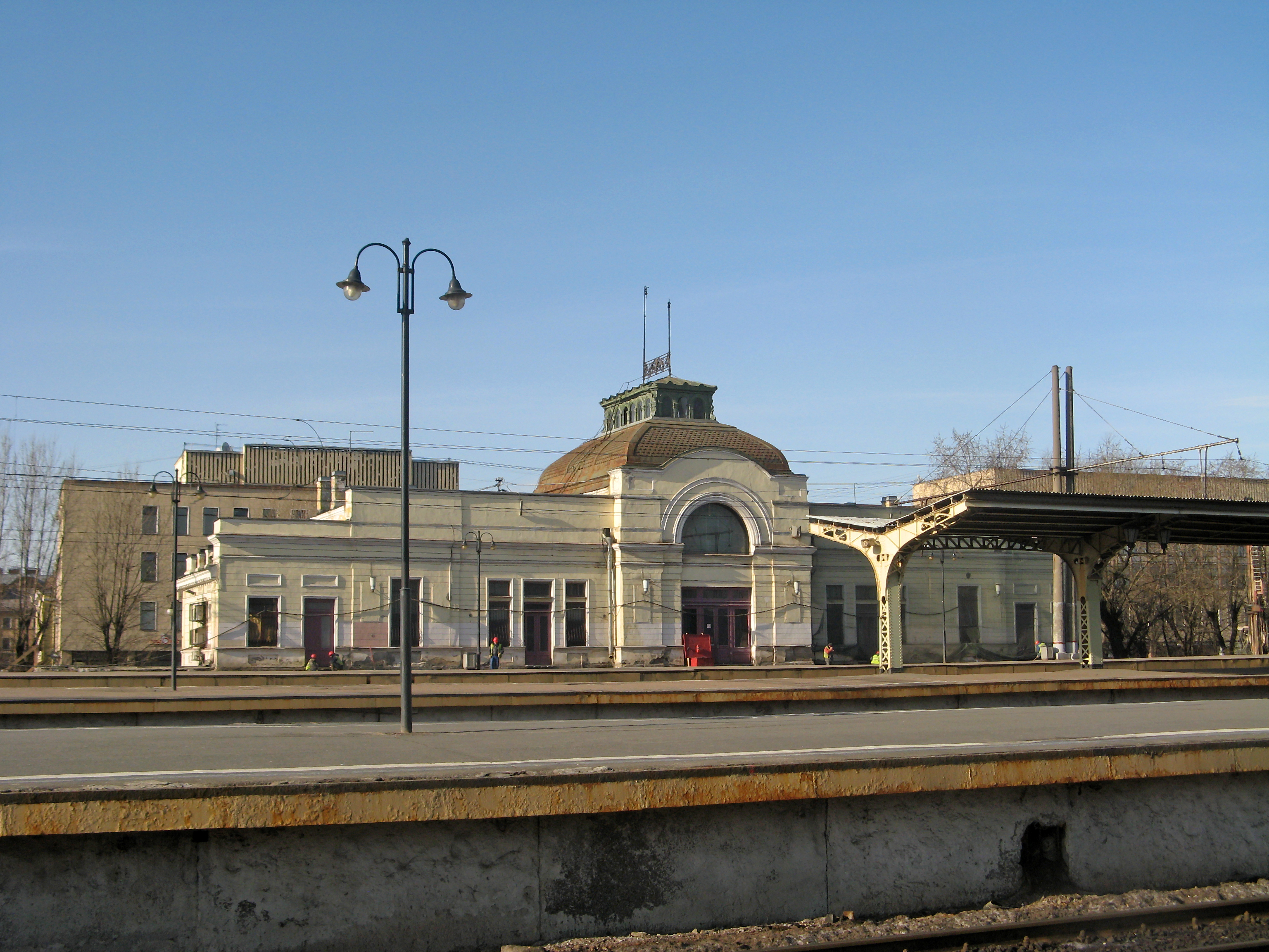 Императорский павильон: Загородный проспект, 52Р, Адмиралтейский район, Санкт-Петербург